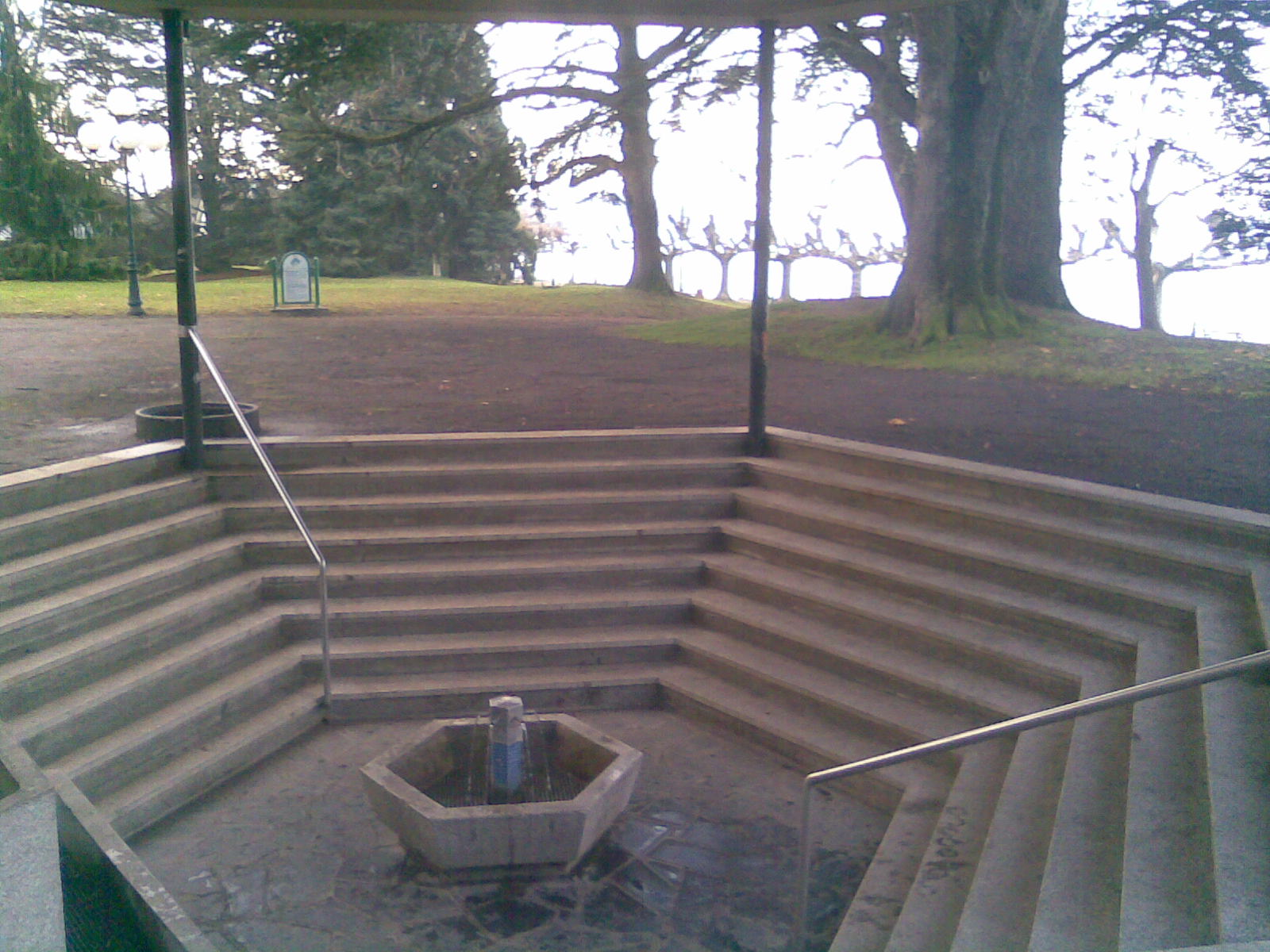 La source Maxima (eau alcaline) d'Amphion-les-bains.